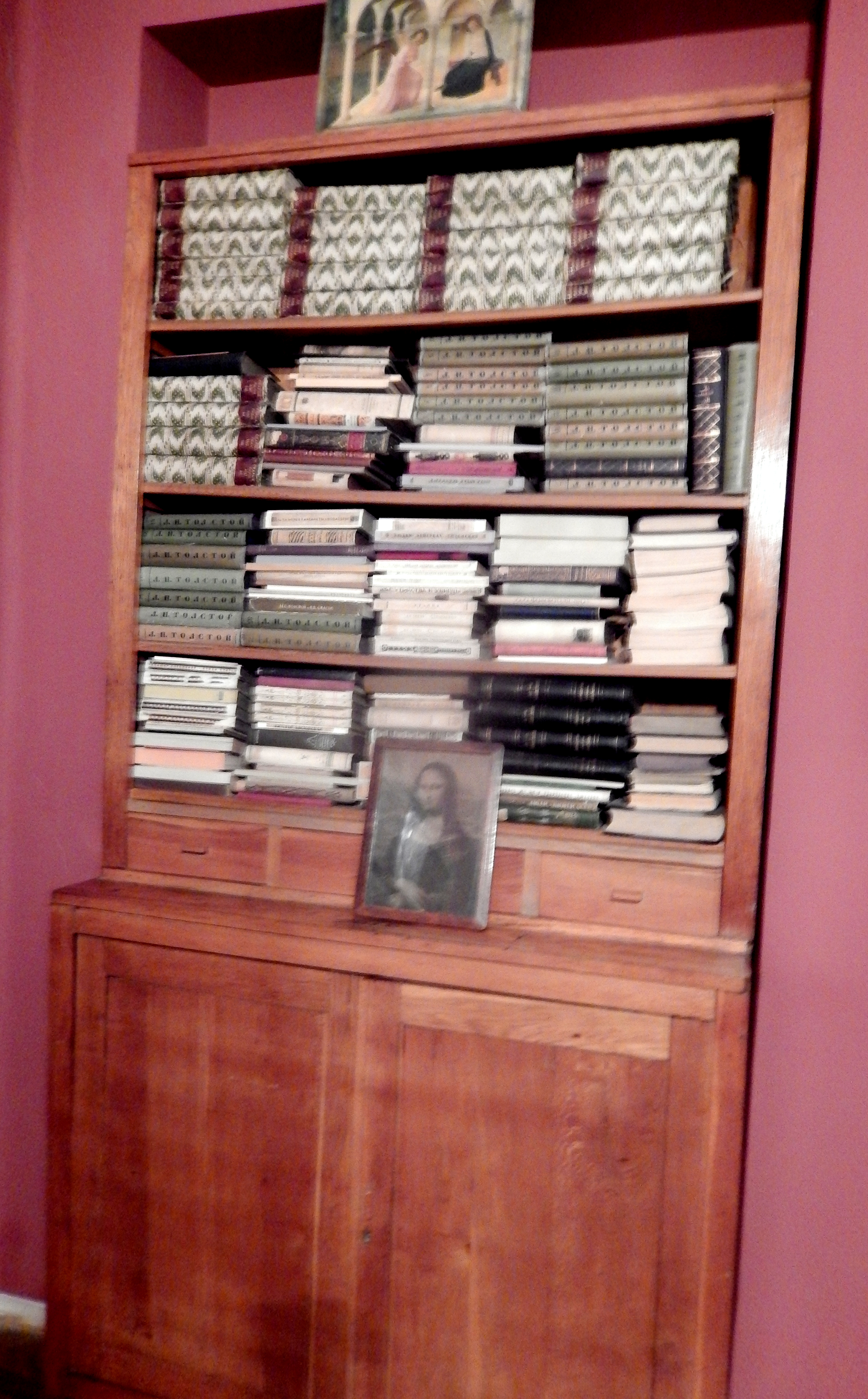 Yeghishe Charents' private Library